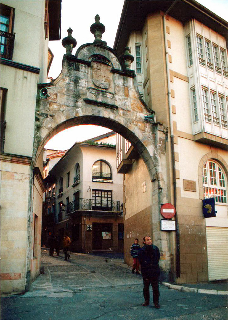 Portaloia Portal de Iturriotz, Mondragón, Guipúzcoa, Euskadi (Spain).